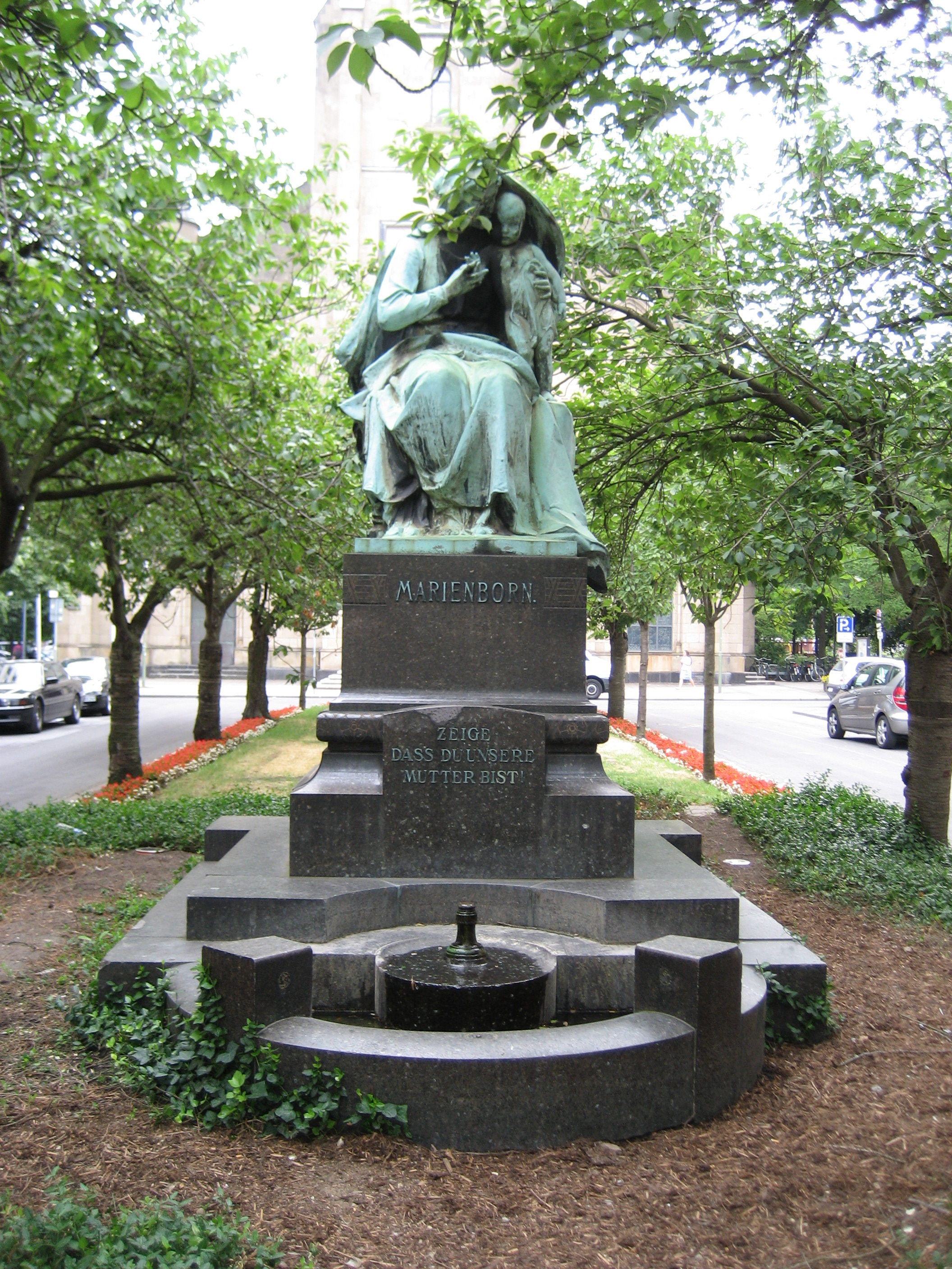 Skulptur in der Grünfläche vor St. Marien.